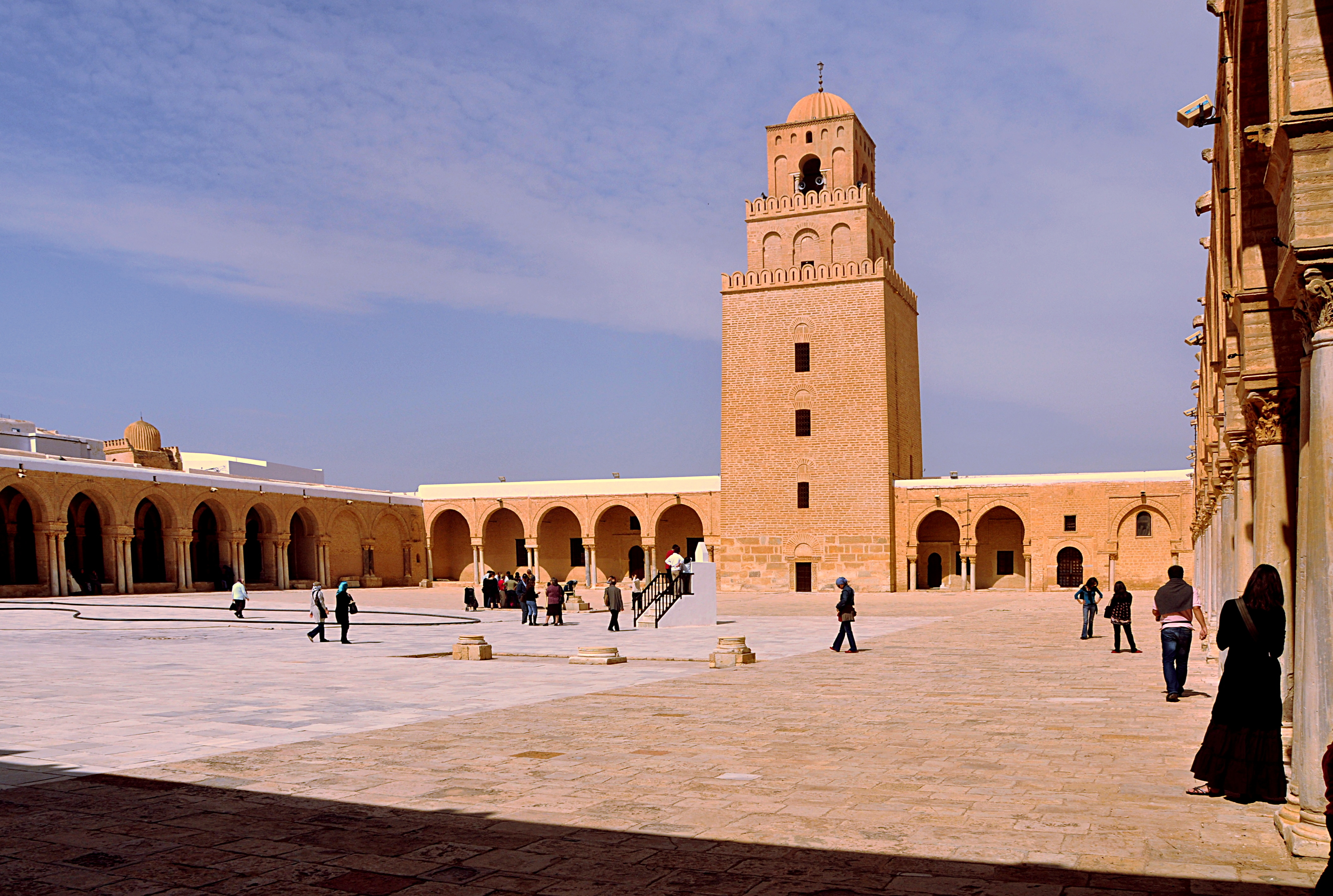 Patio et minaret de la grande mosquée de Kairouan, Tunisie